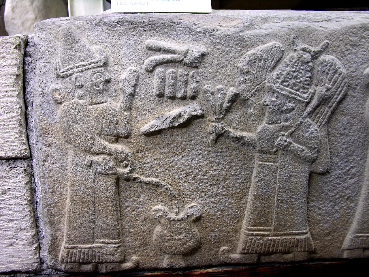 Turkey-1598